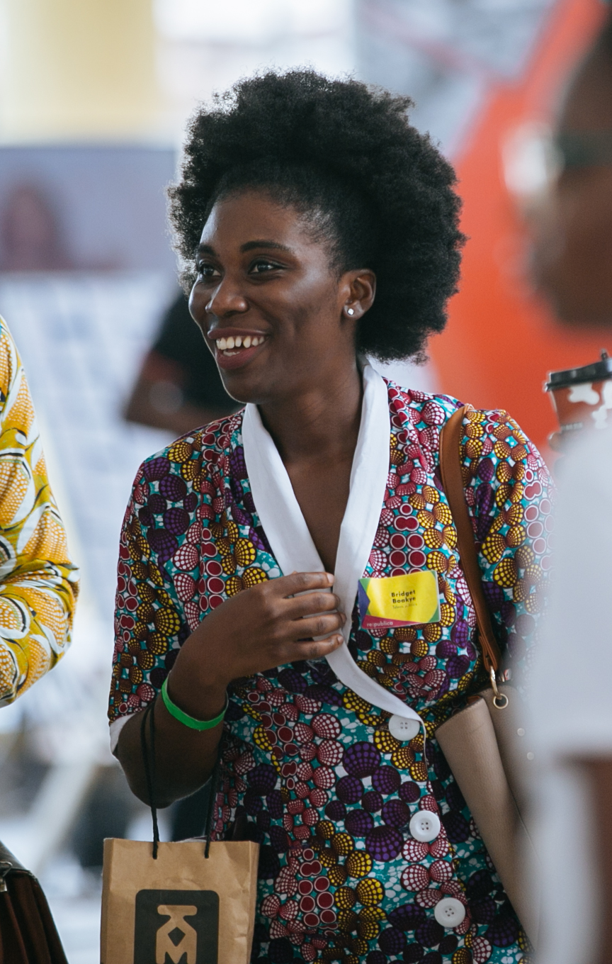 Photo: © Nana Afriyie